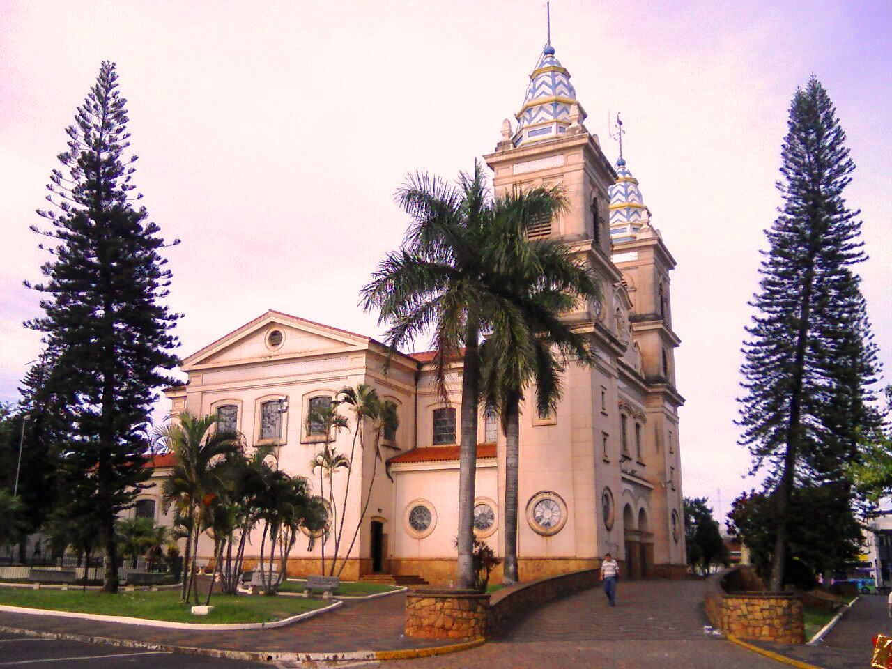 Matriz de Porto Ferreira - Fachada lateral